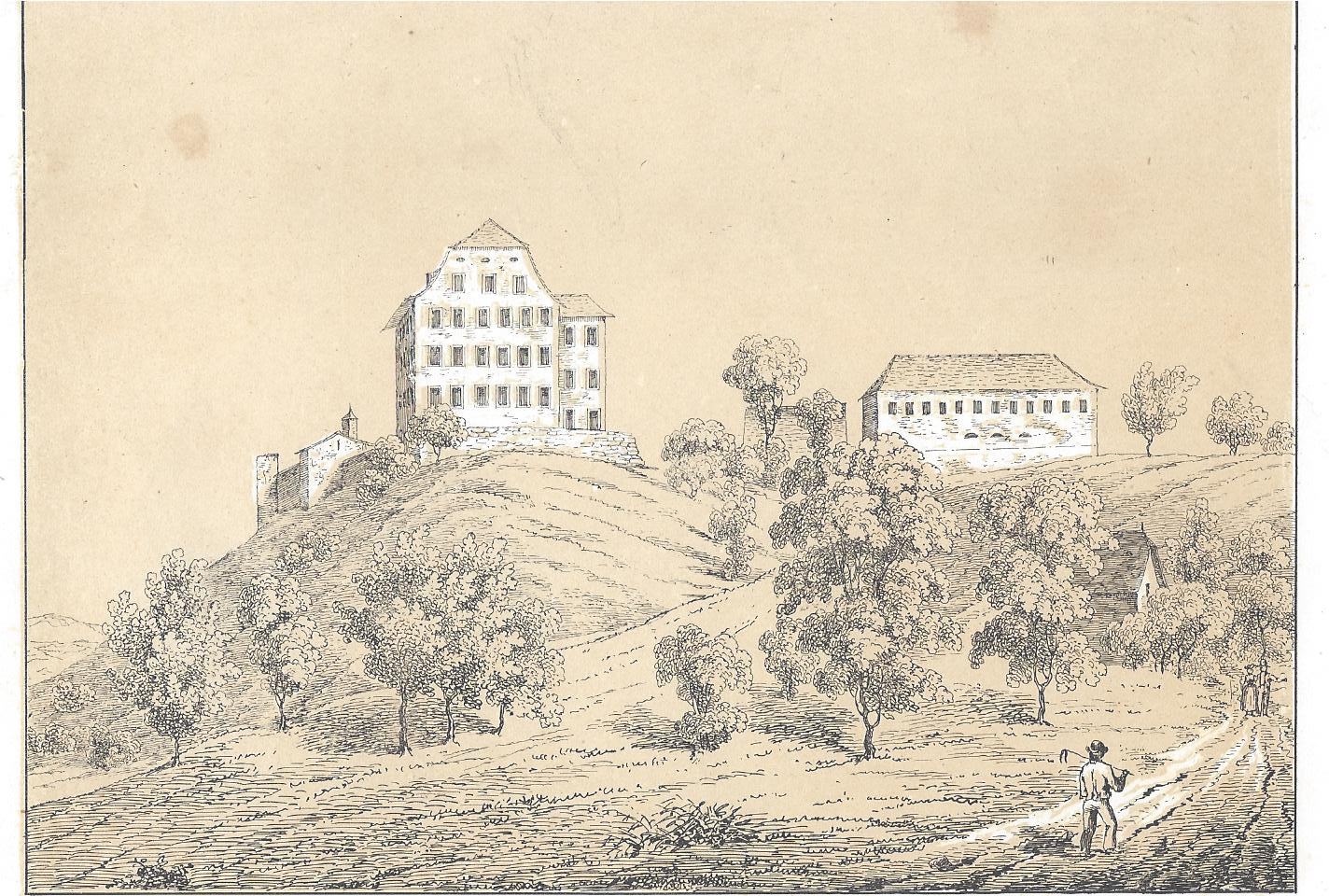 Johann-Friedrich Wagner: Federlithografie auf einer Tonplatte mit Darstellung des im Juli 1844 abgebrannten Schlosses Bernau im Aargau.(Verlag der lithograf. Anstalt von J. F. Wagner, Bern, 1840)